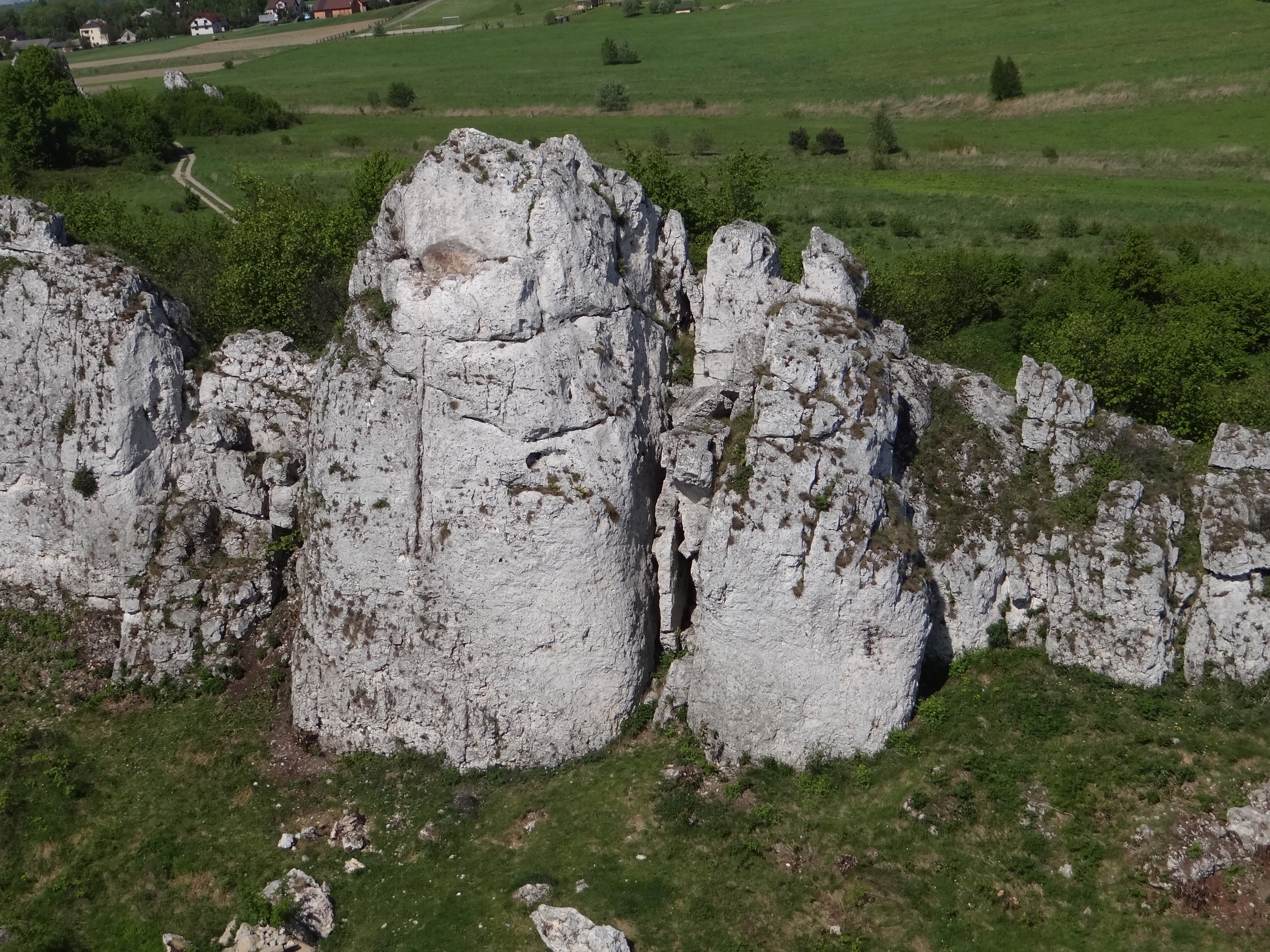 Skała Mały Mur w Jerzmanowicach